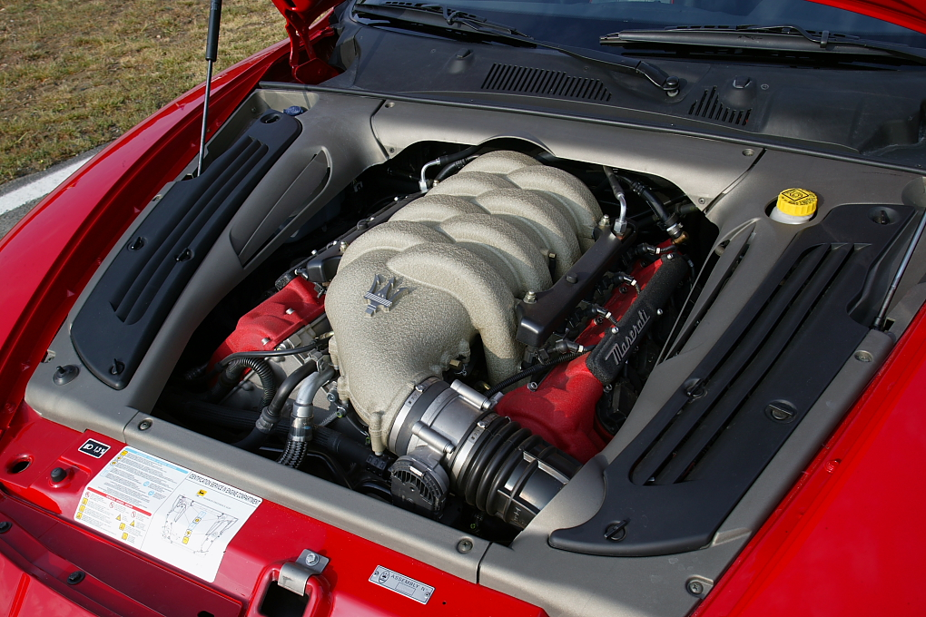 Maserati V8 4.2l engine.